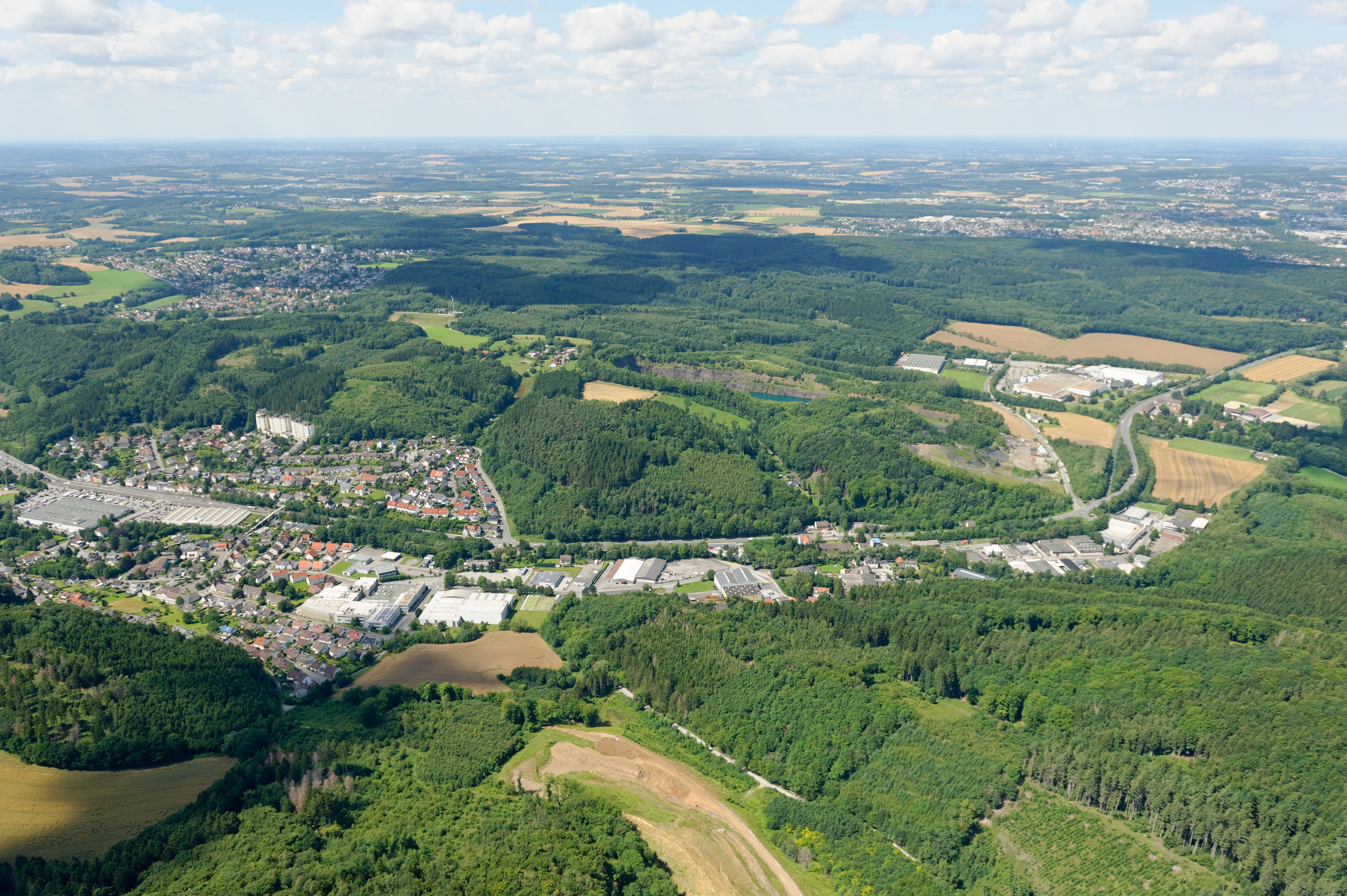 Fotoflug Sauerland West. Luftaufnahme: Hemer-Becke (unterer Bildbereich), Hemer-Stübecken (oberer Bildbereich links), Menden (oberer Bildbereich im Hintergrund), Nordrhein-Westfalen.